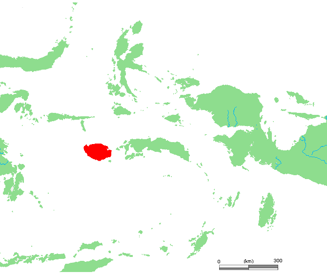 ID Buru.PNG